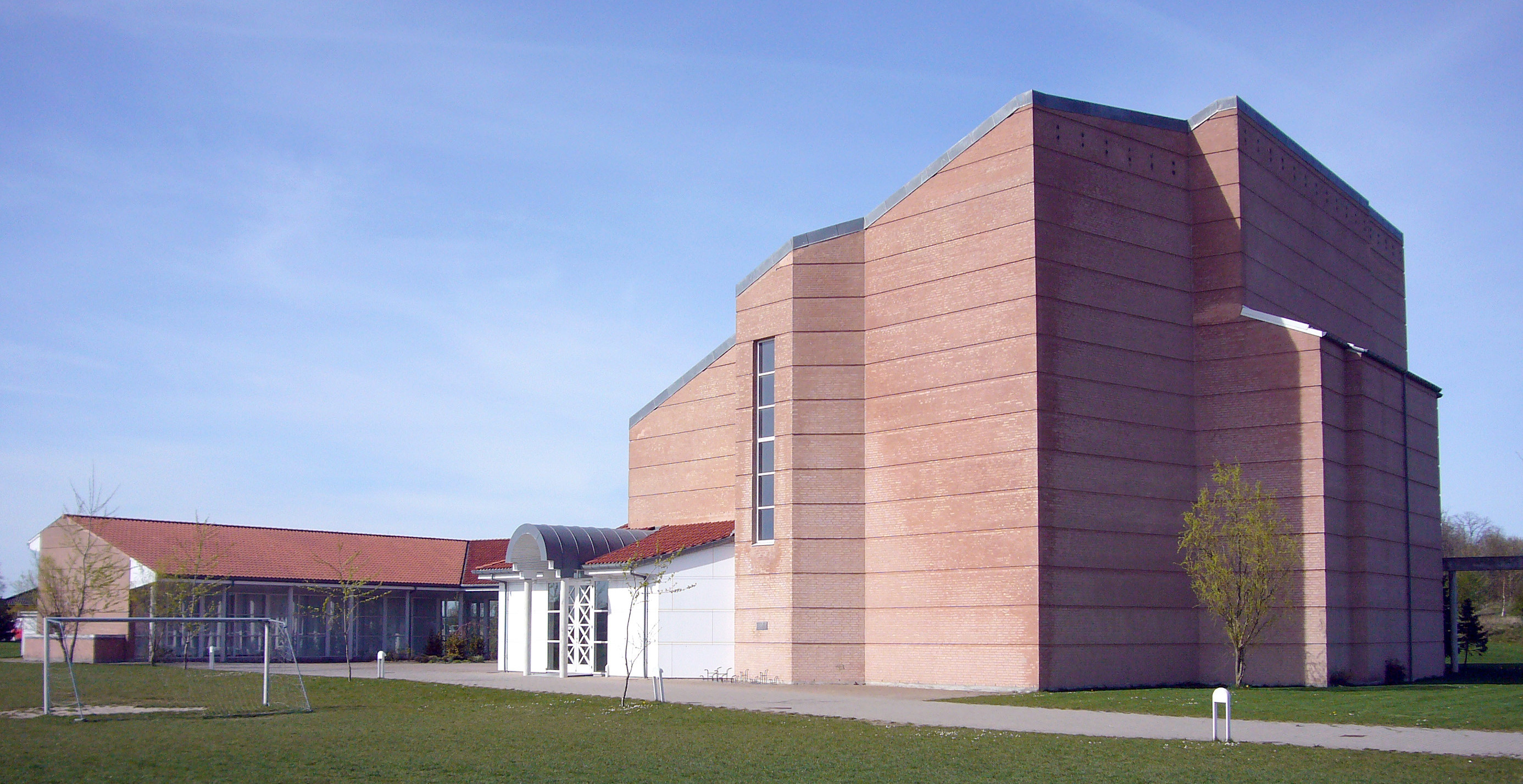 Sankt Pauls Kirke, Høje Taastrup, Denmark. Catholic.